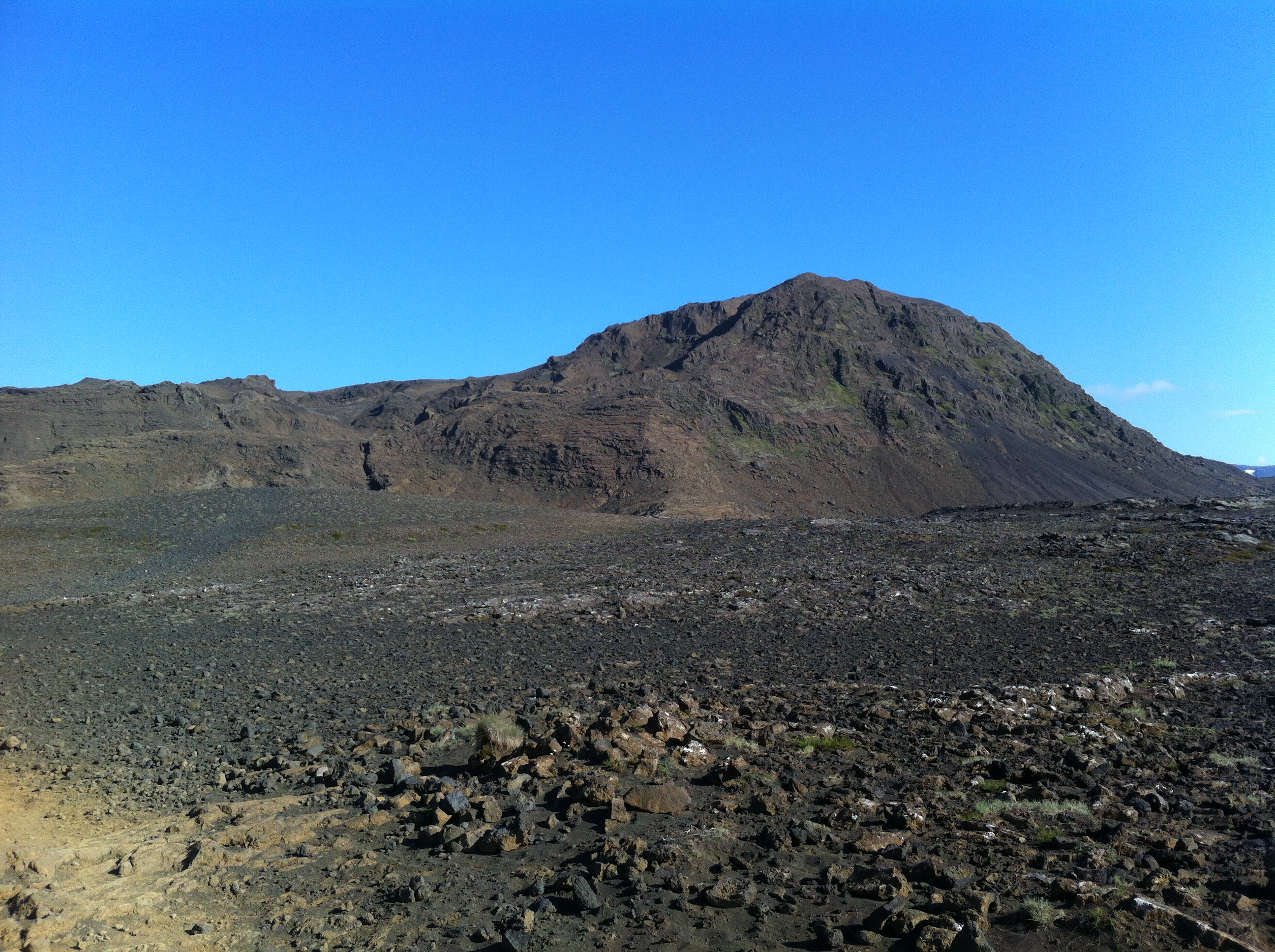 Helgafell ofan Hafnarfjarðar